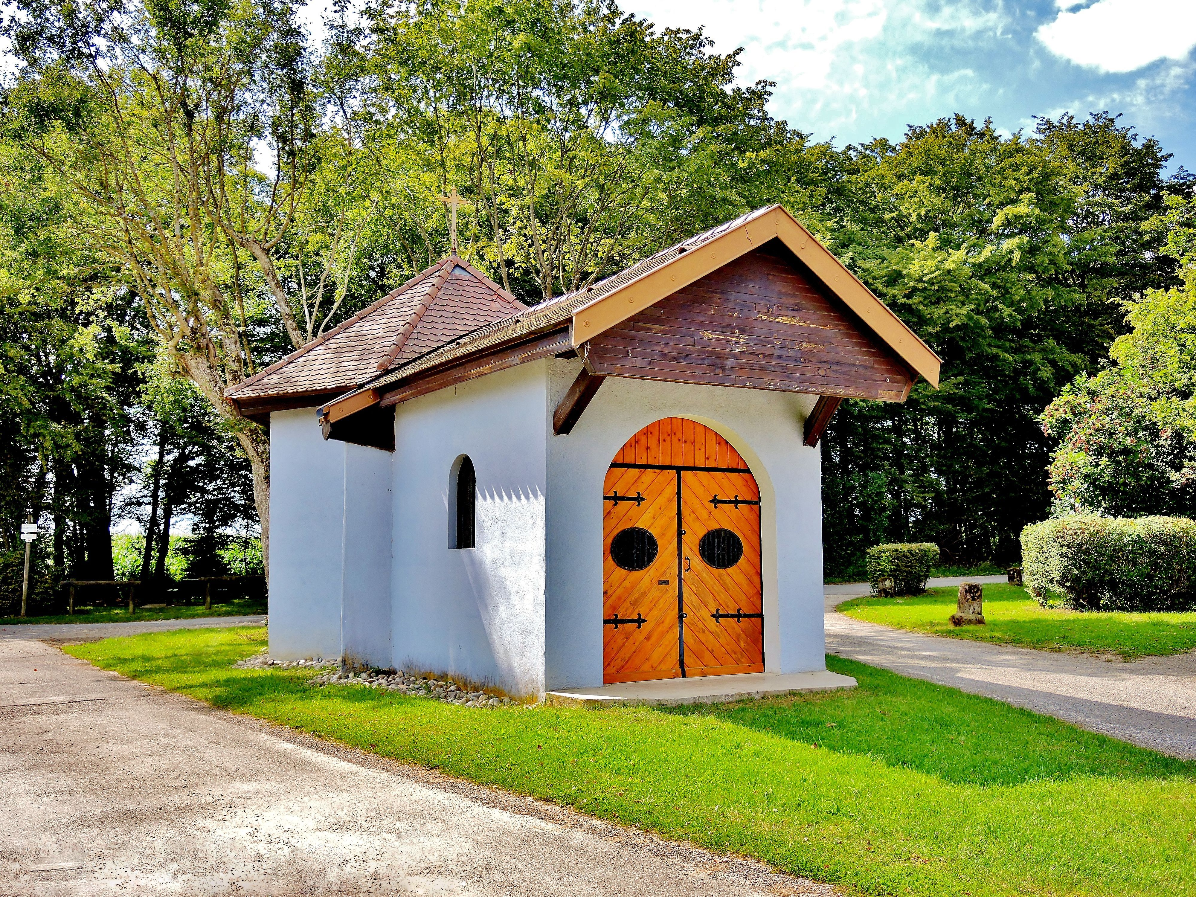 Chapelle Notre-Dame-du-Chêne. Chemin du fort du bois d'Oye. Bermont. Territoire de Belfort